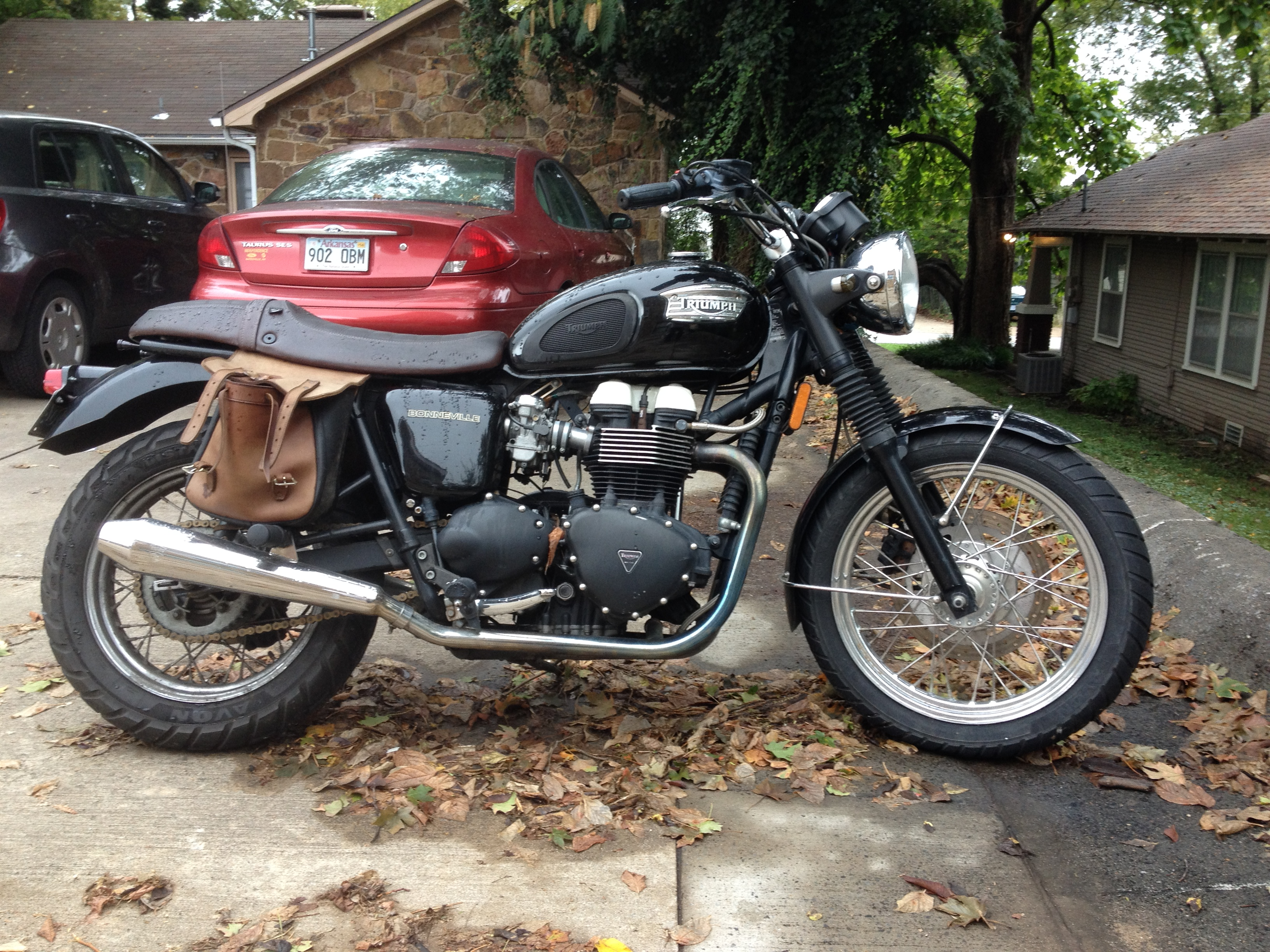 Fayetteville Arkansas USA